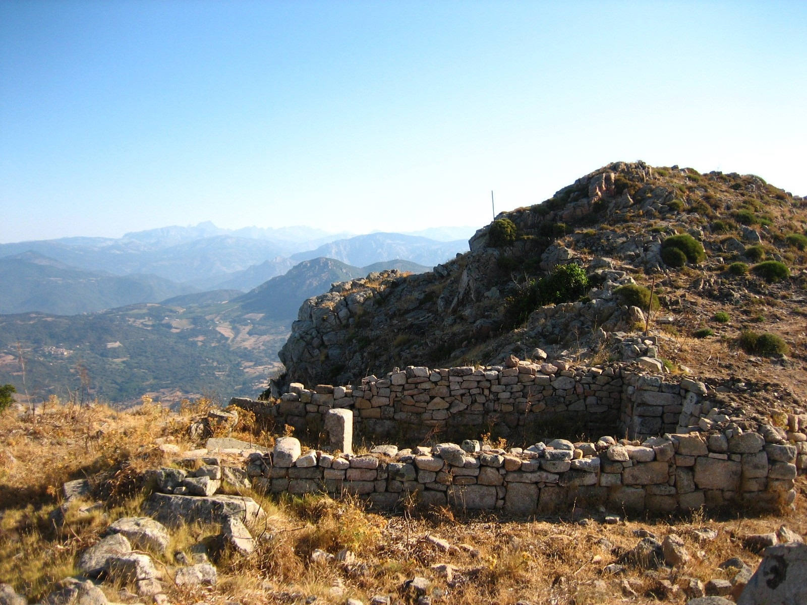 ruine de chapelle d'appietto